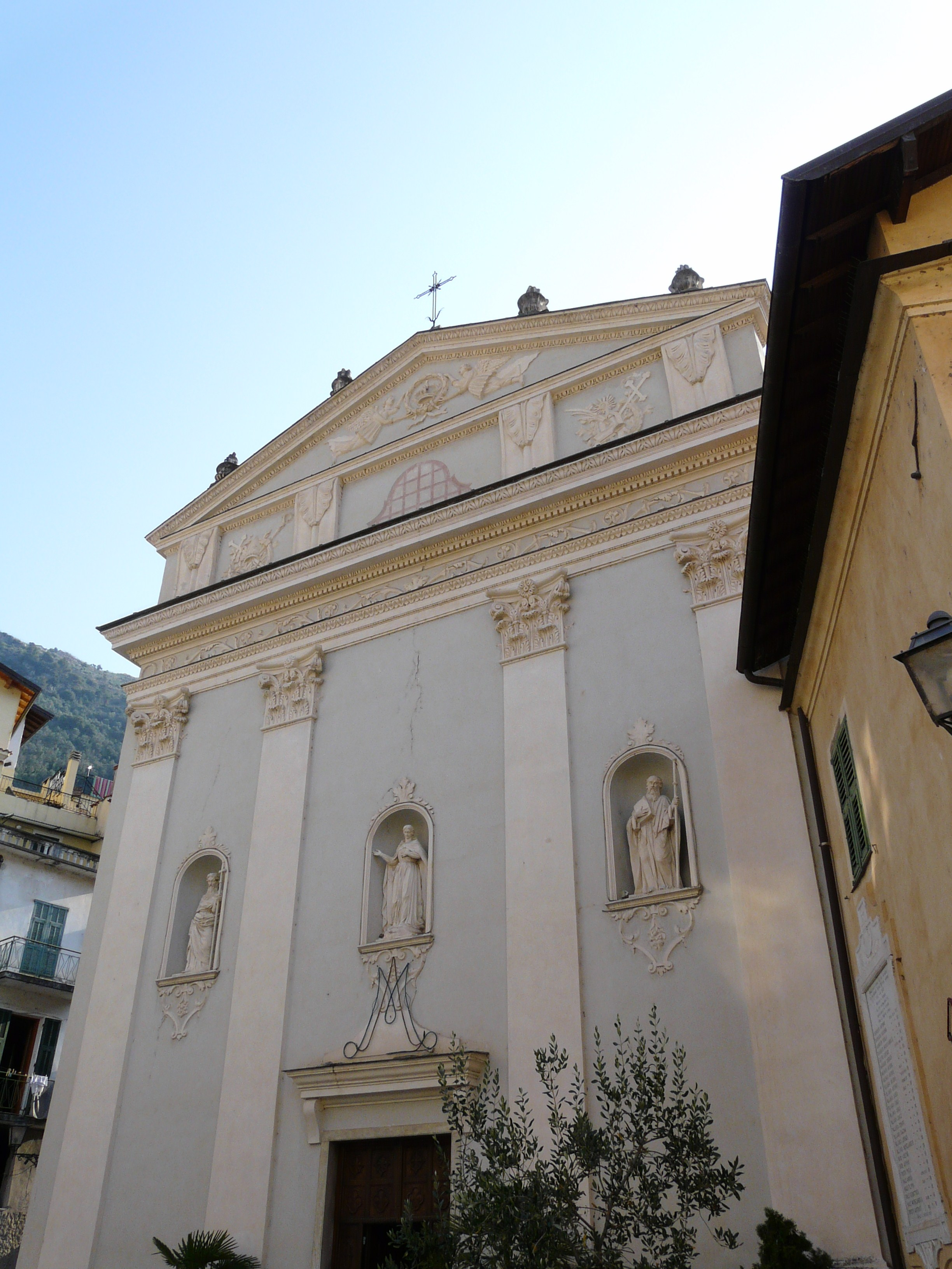 Chiesa dei santi Filippo e Giacomo, Airole, Liguria, Italia